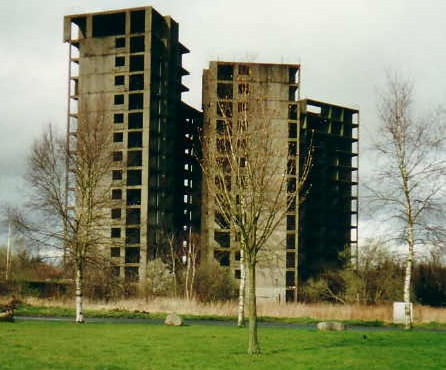 Hochhausruine (wurde Ende 2001 beseitigt)